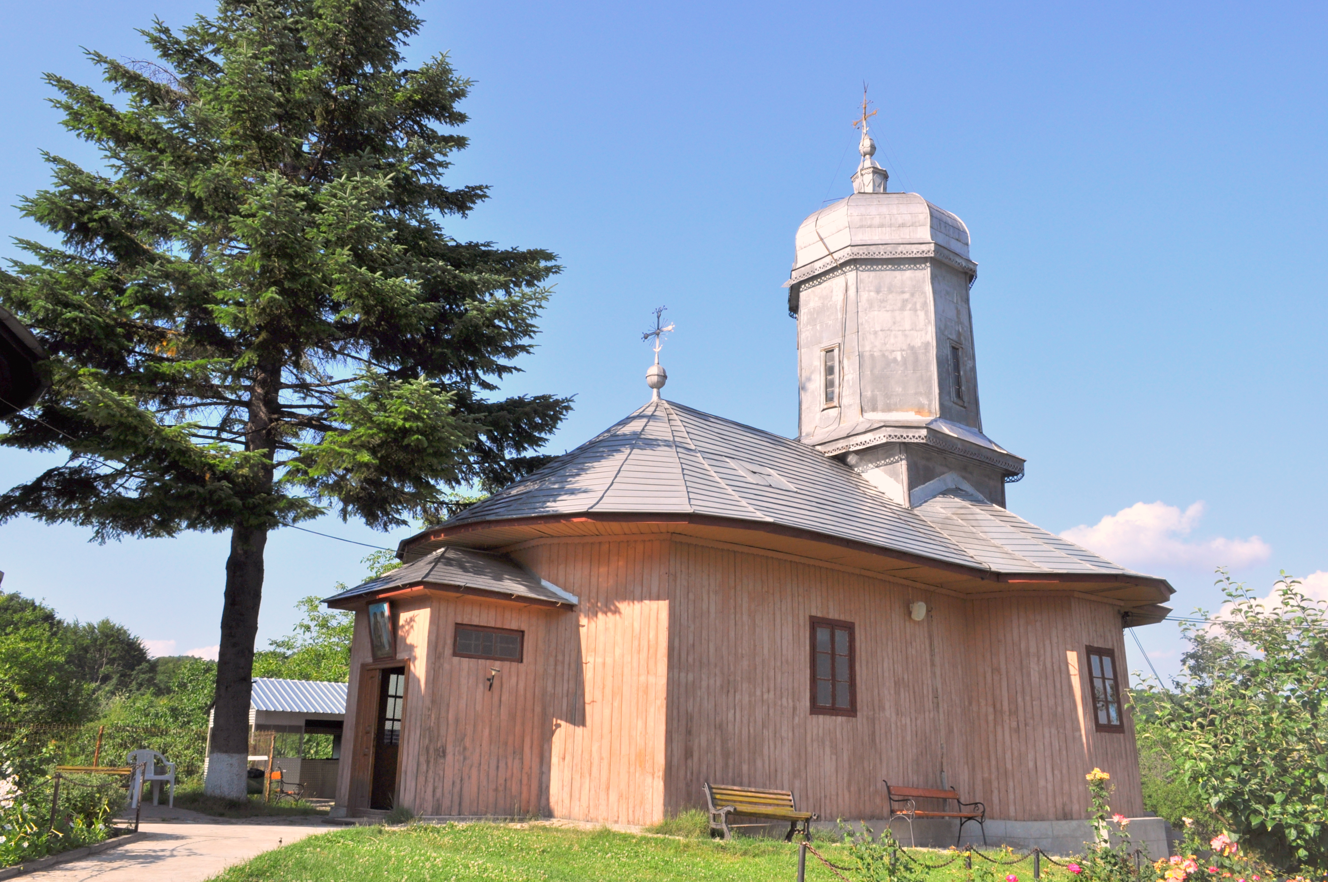 Mănăstirea Dălhăuți, Vrancea 01